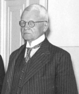 Jannes Johannes Cornelis van Dijk (1871-1954), Nederlands politicus